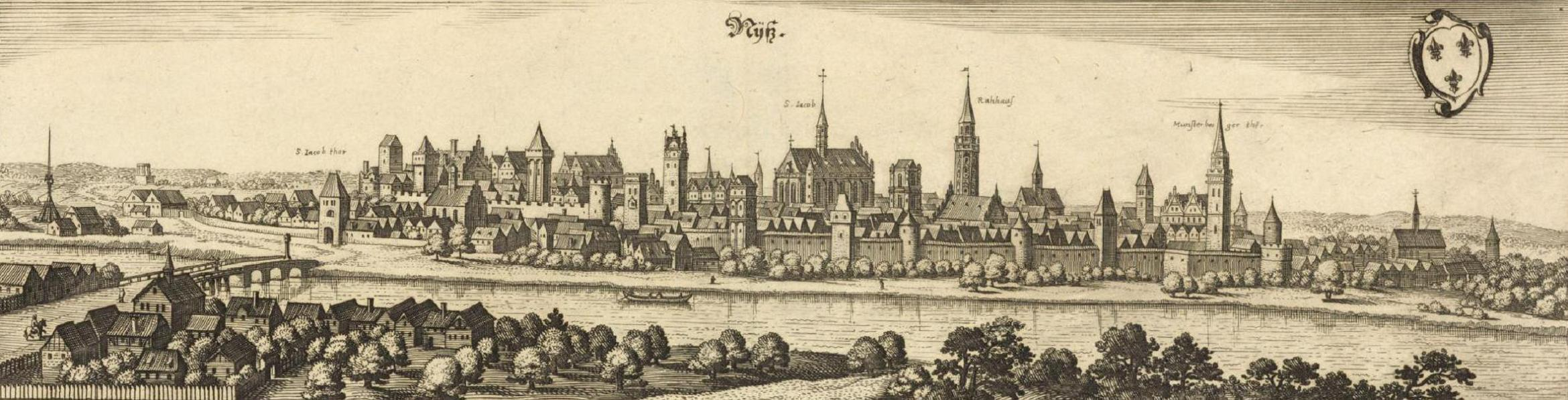 Nysa Panorama